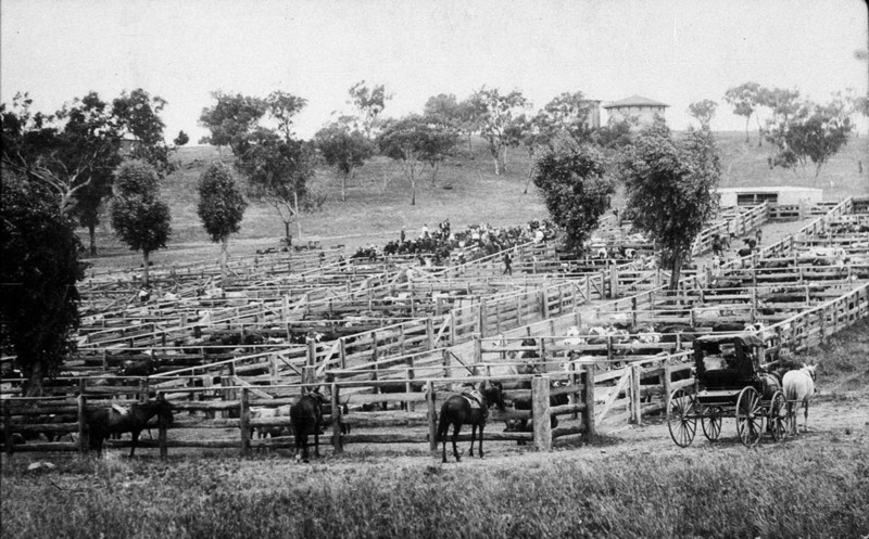 Quirindi saleyards